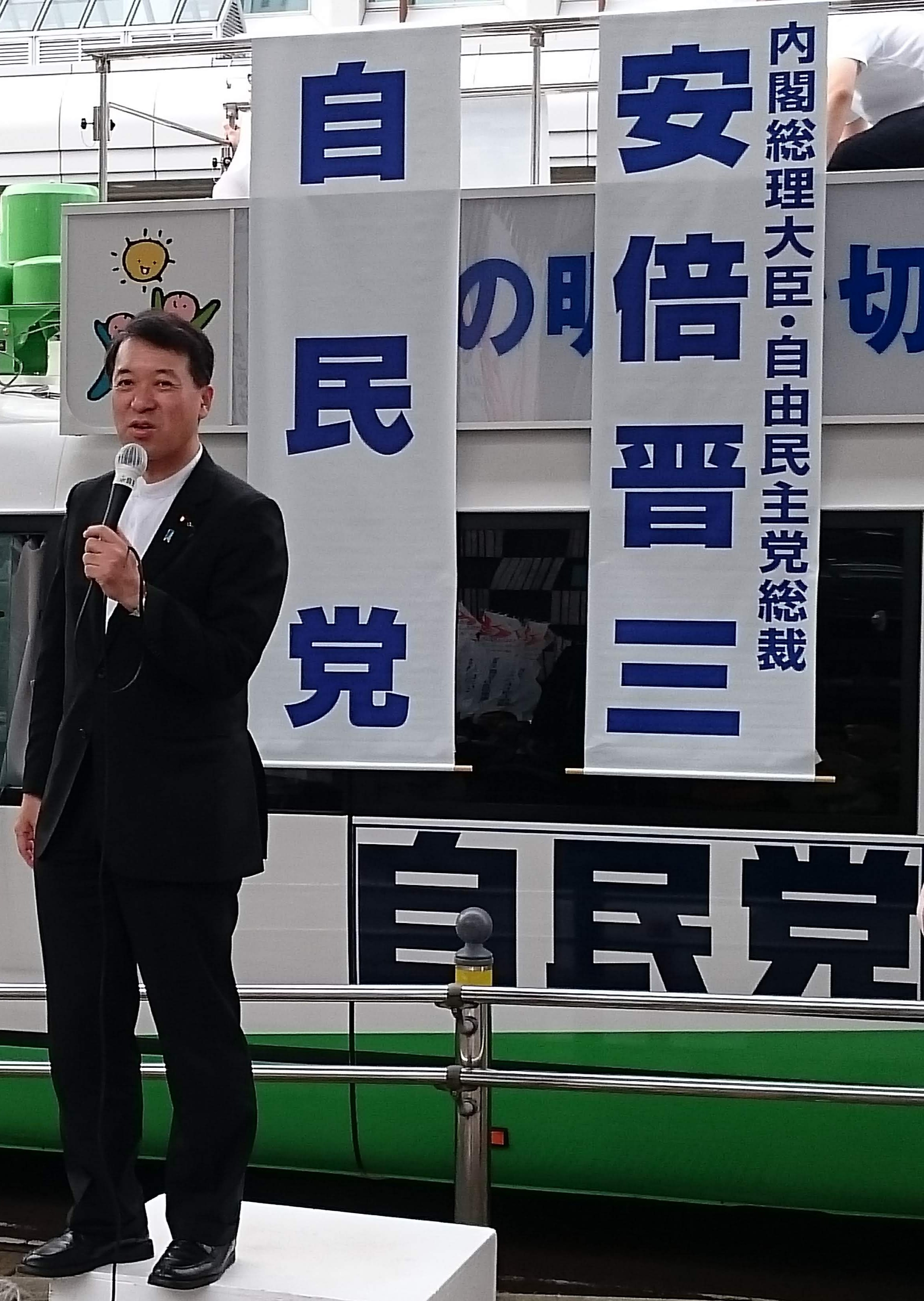 衆議院議員の泉田 裕彦（新潟県 長岡市にて）